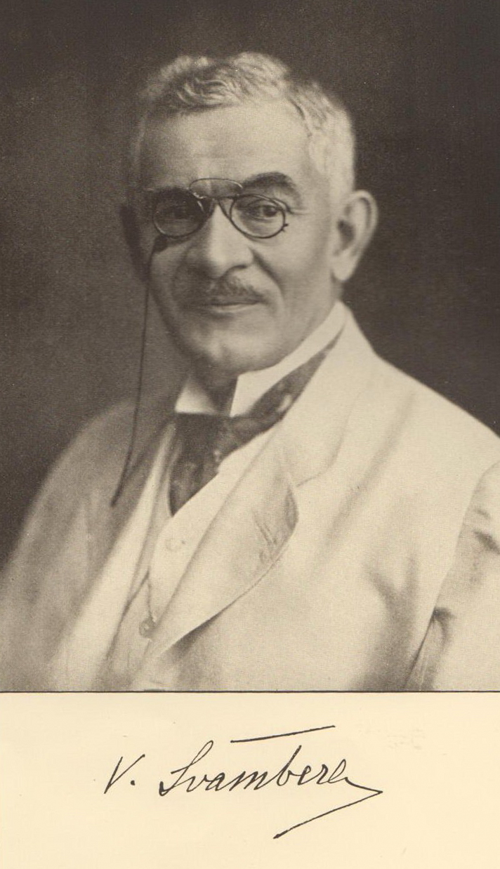 Prof. PhDr. Václav Švambera (1866-1939), profesor zeměpisu na Přírodovědecké fakultě Univerzity Karlovy.